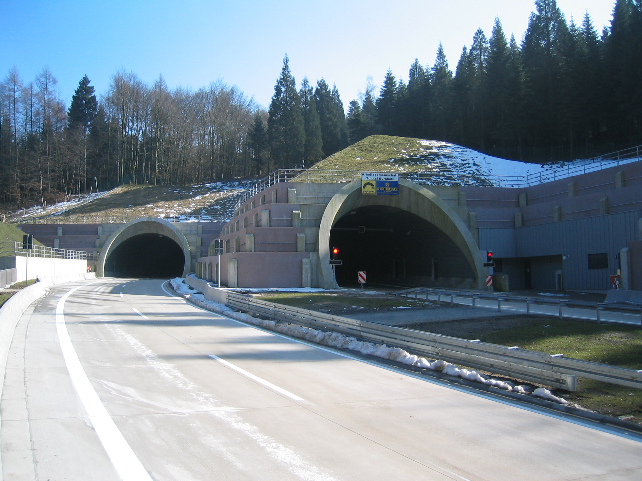 Burgholztunnel in Wuppertal. Westportal. Einfahrt. Fahrtrichtung Bergauf. Sonnborn - Cronenberg (Foto: 1 1/2 Wochen vor Eröffnung).